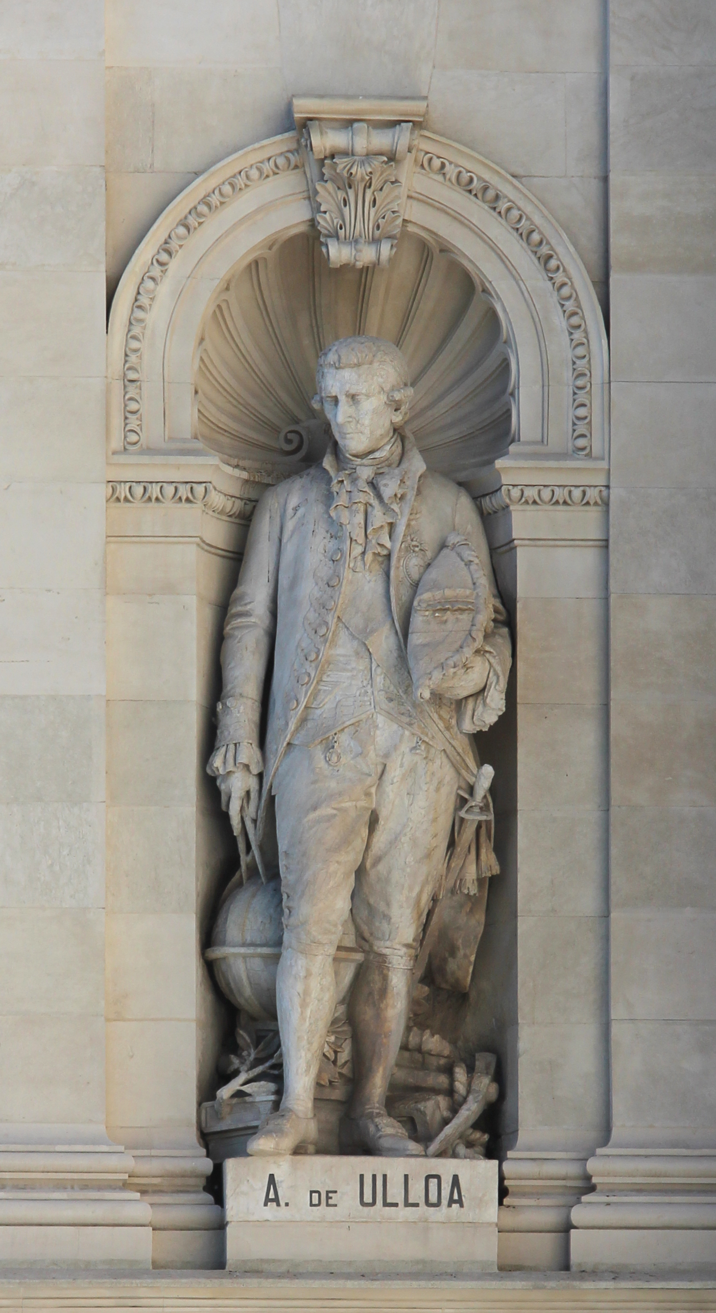 Statue of Antonio de Ulloa